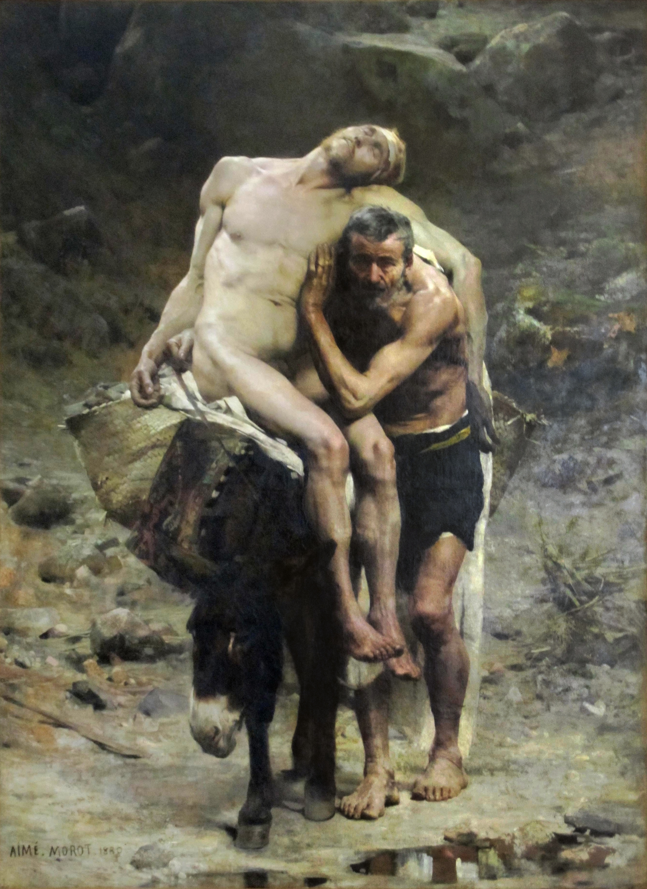 Le bon Samaritain